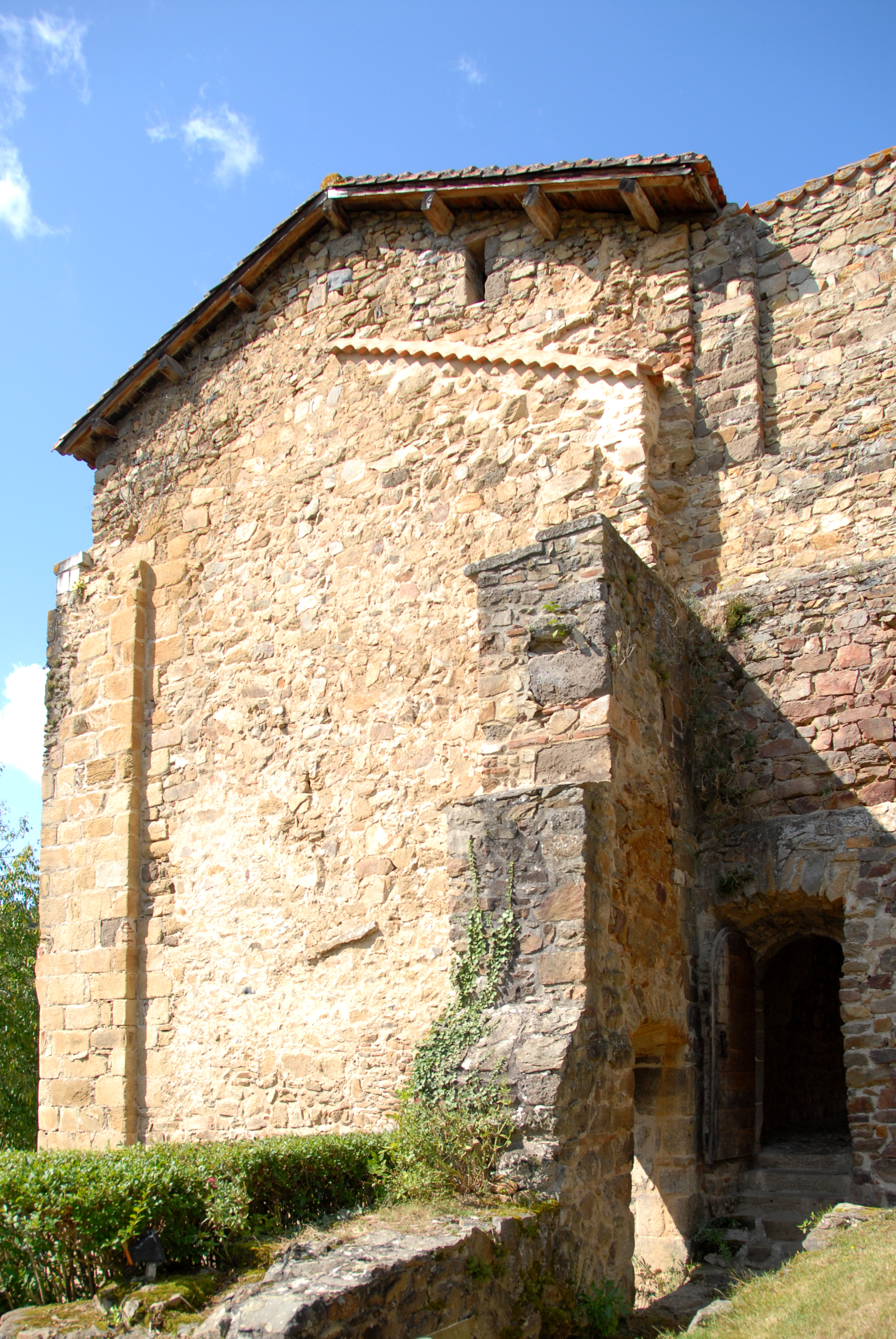 Abtei St.-André Lavaudieu, Refektorium Ostgiebel, Relikte von Angauten